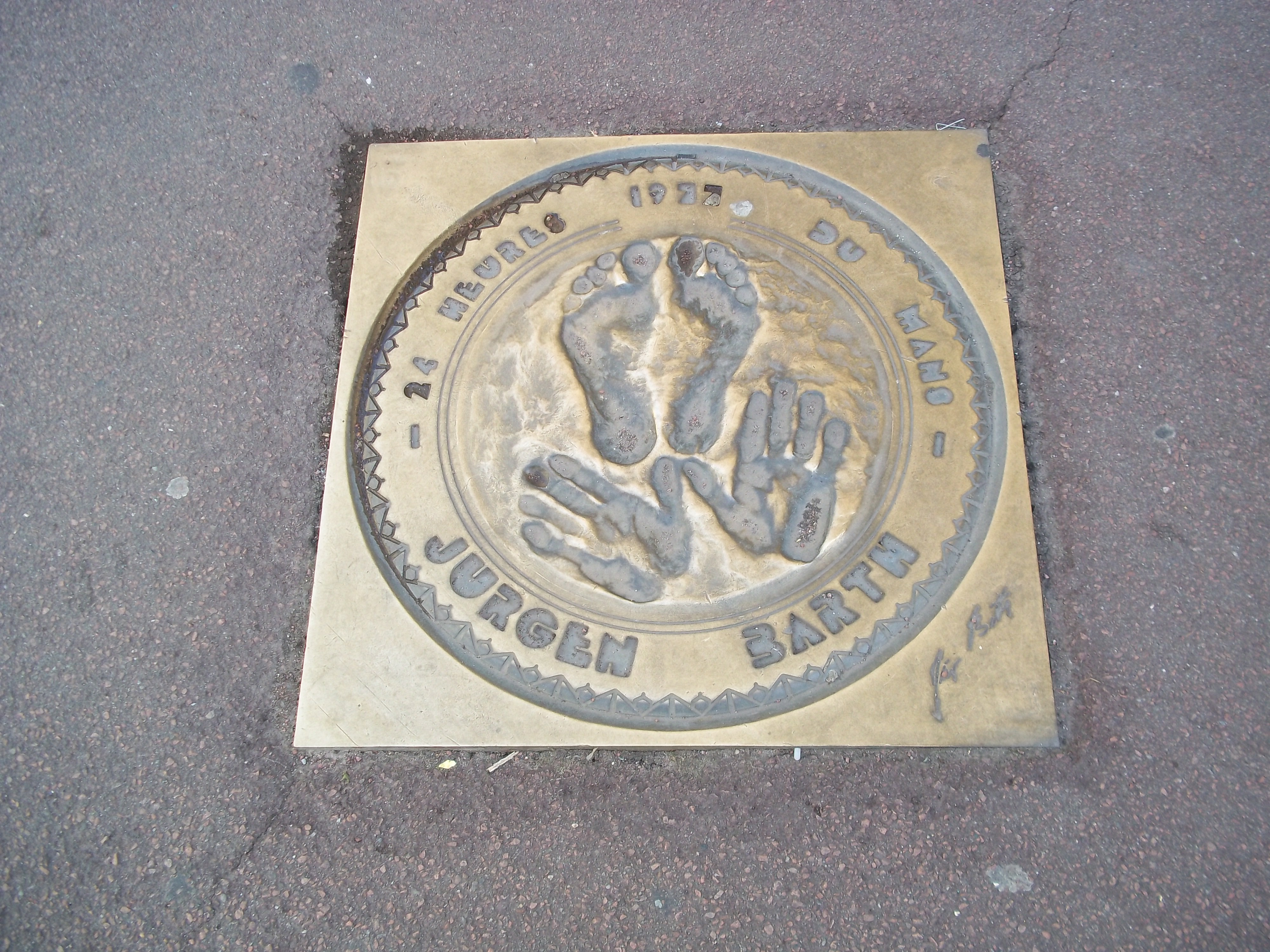 Plaque bronze des empreintes de J. Barth, Pilote vainqueur édition 1977 des 24 heures du Mans